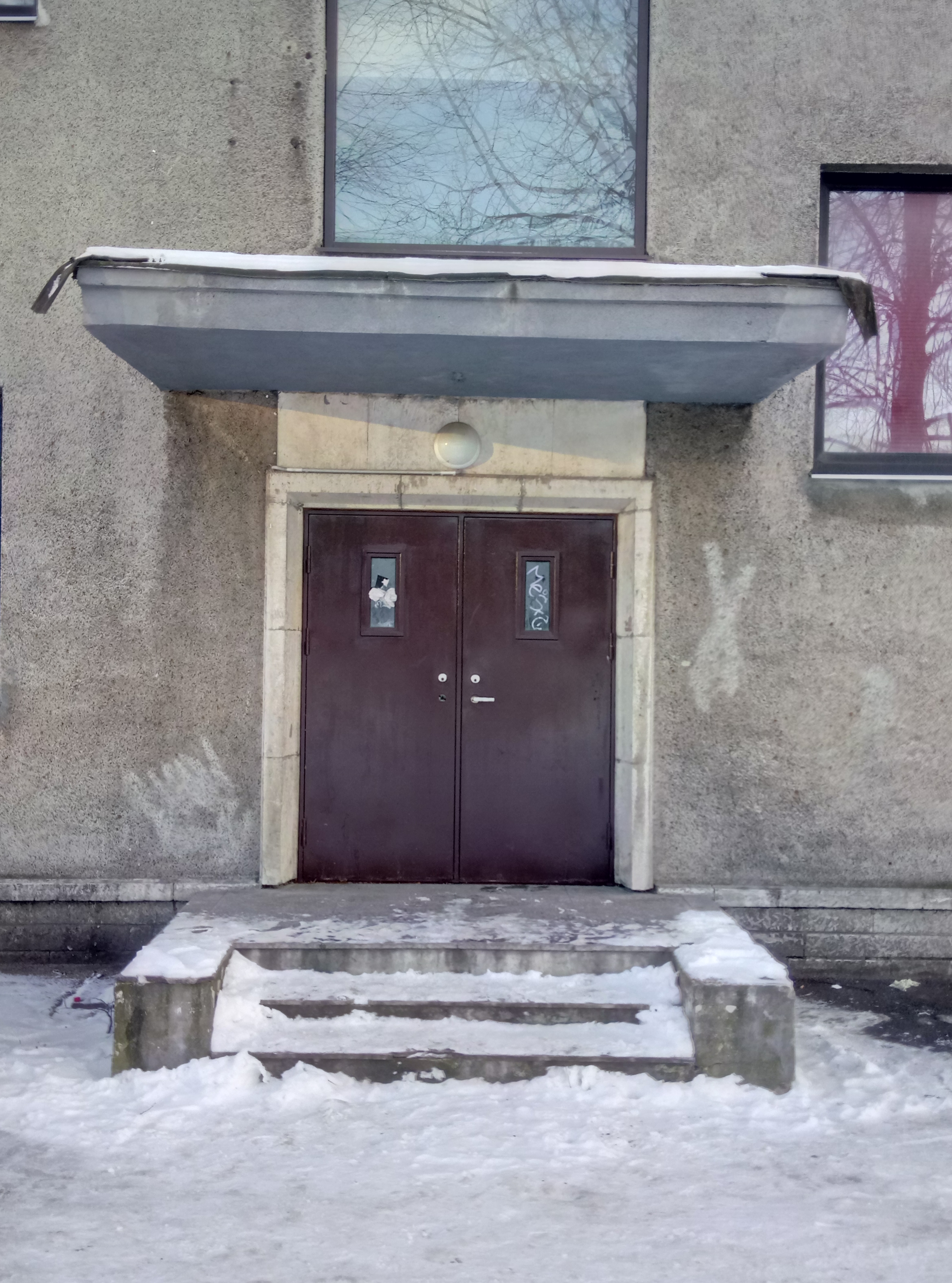 Vaade kinole läänekülje sissekäigu ukseraamistusele, mis on tehtud Selgase dolomiidist.Foto: Robert Treufeldt, 16. jaanuar 2019